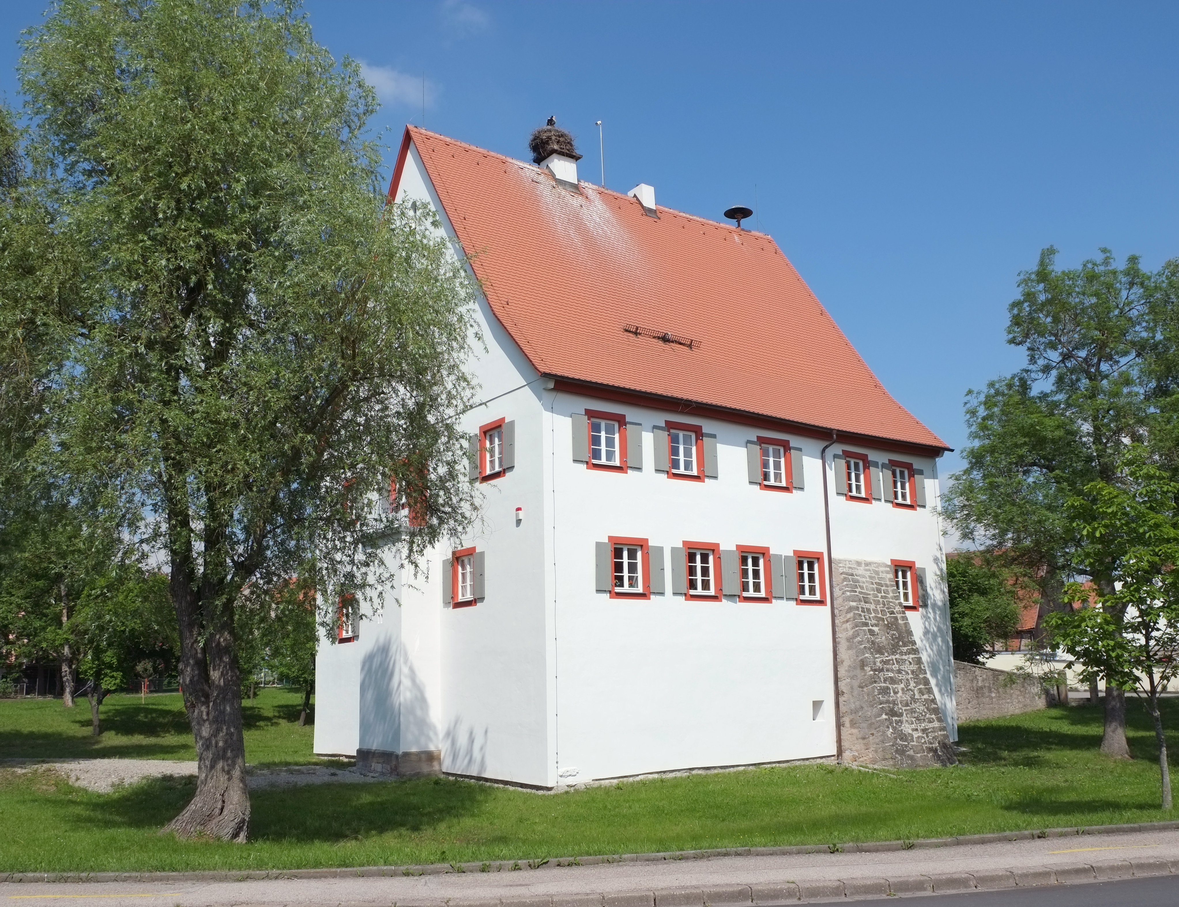 Ehemalige Vogtei, heute Rathaus, in Aurach im Landkreis Ansbach (Bayern)